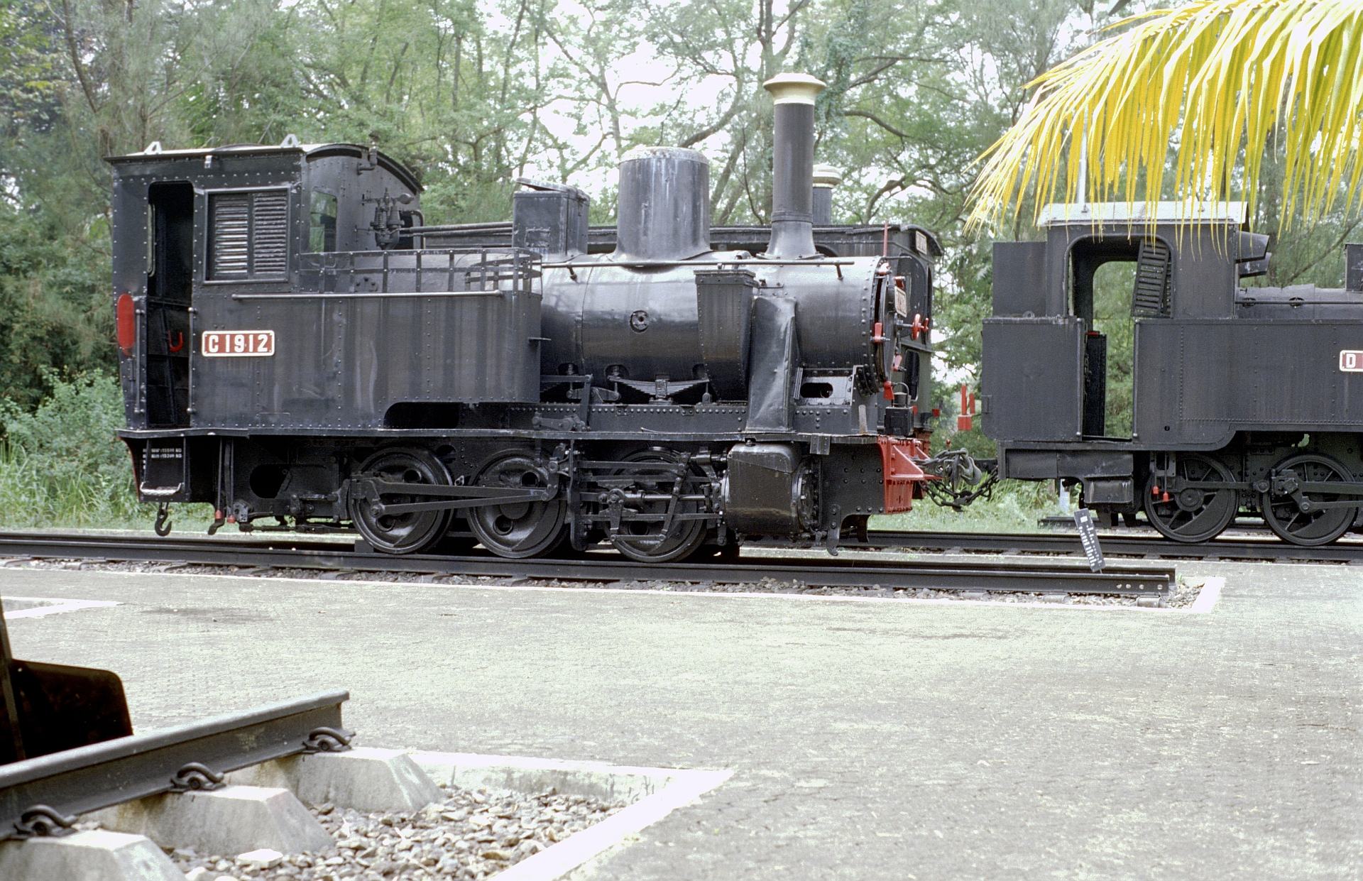 DKA C19 (19 12 A)